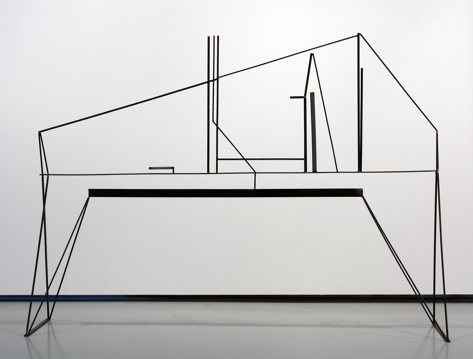 Kjell Varvins skulptur O'HOY (1995)